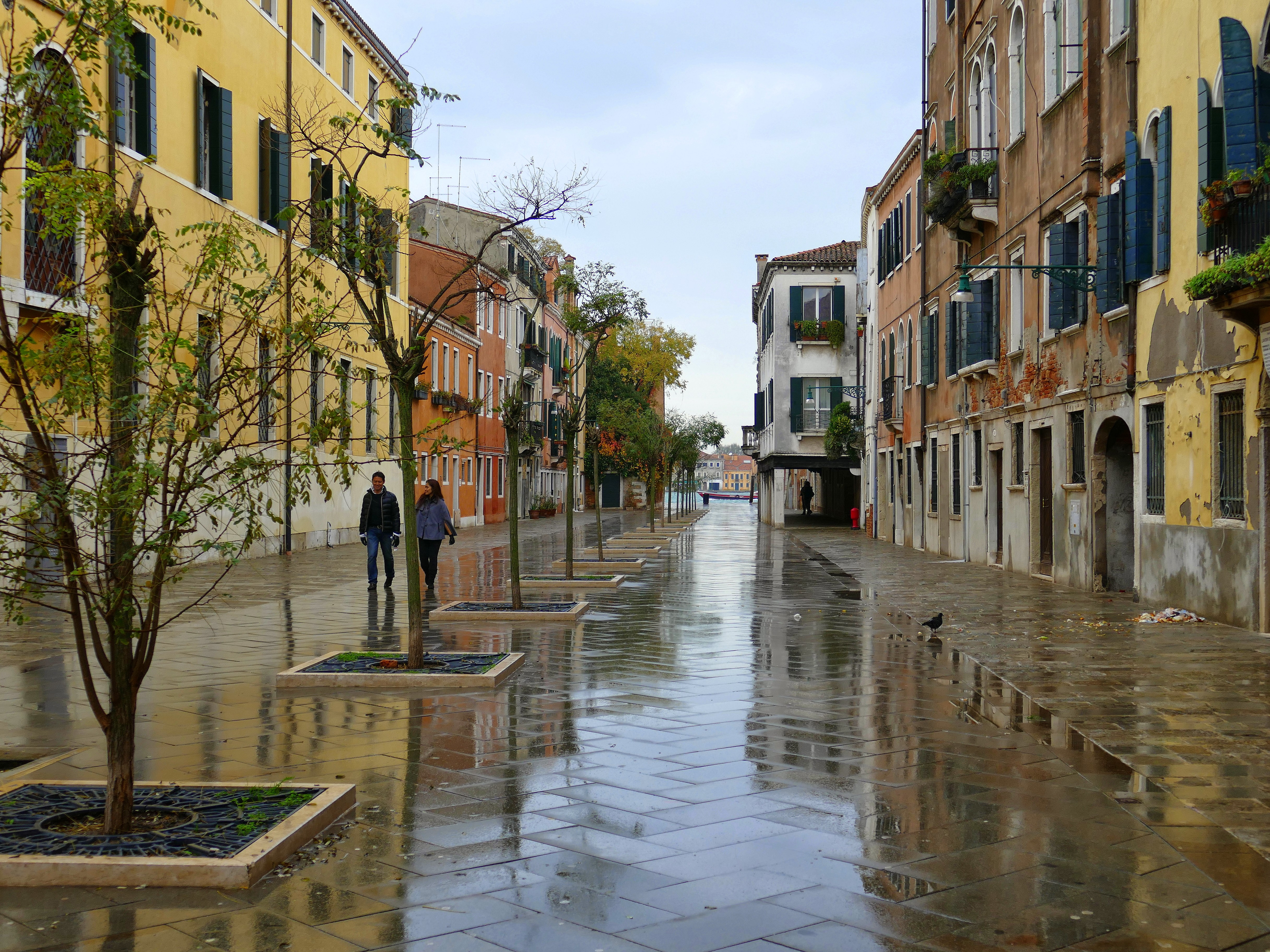 Dorsoduro, 30100 Venezia, Italy